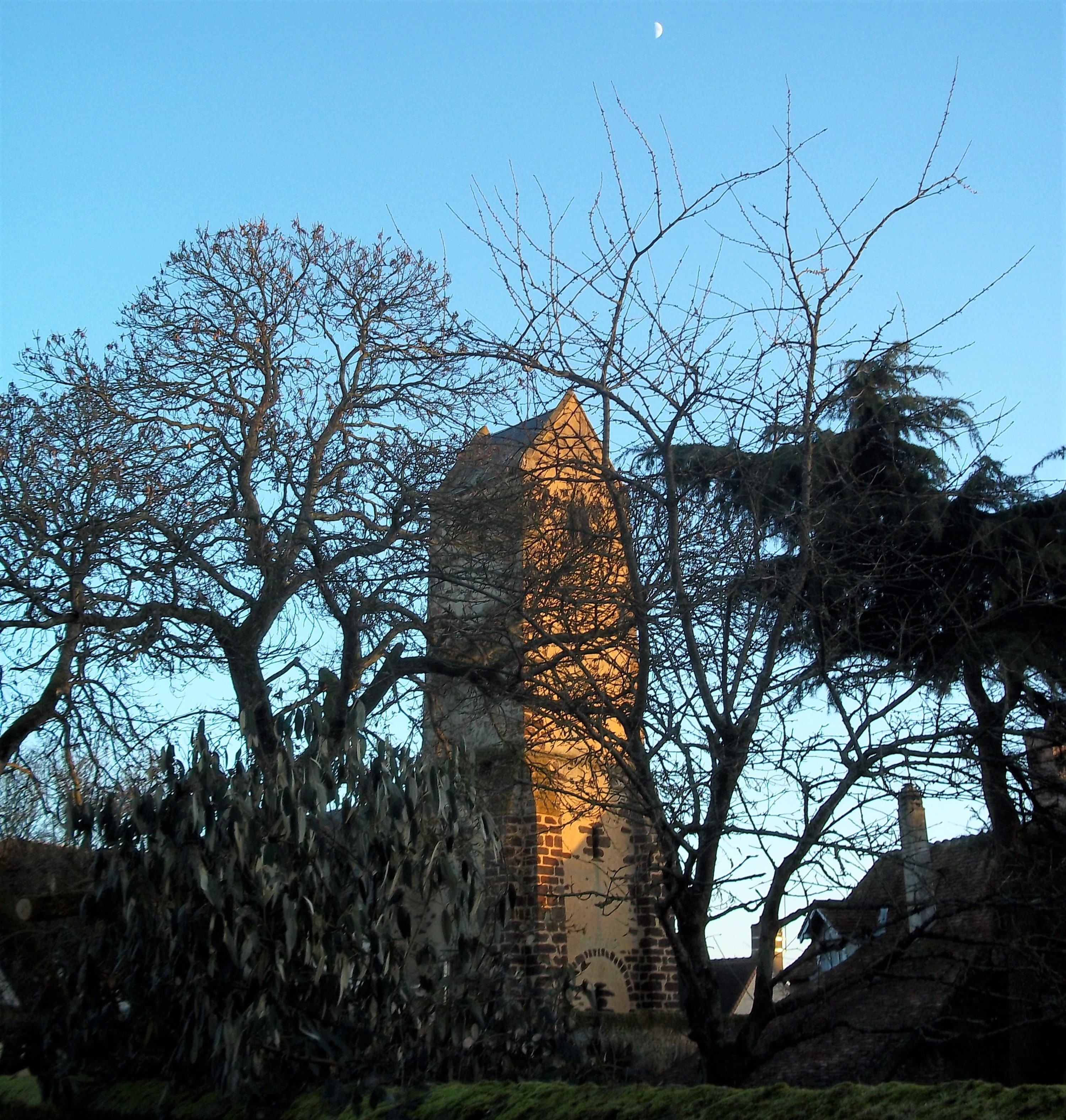 Le clocher de l'église - Assé le Riboul- Sarthe